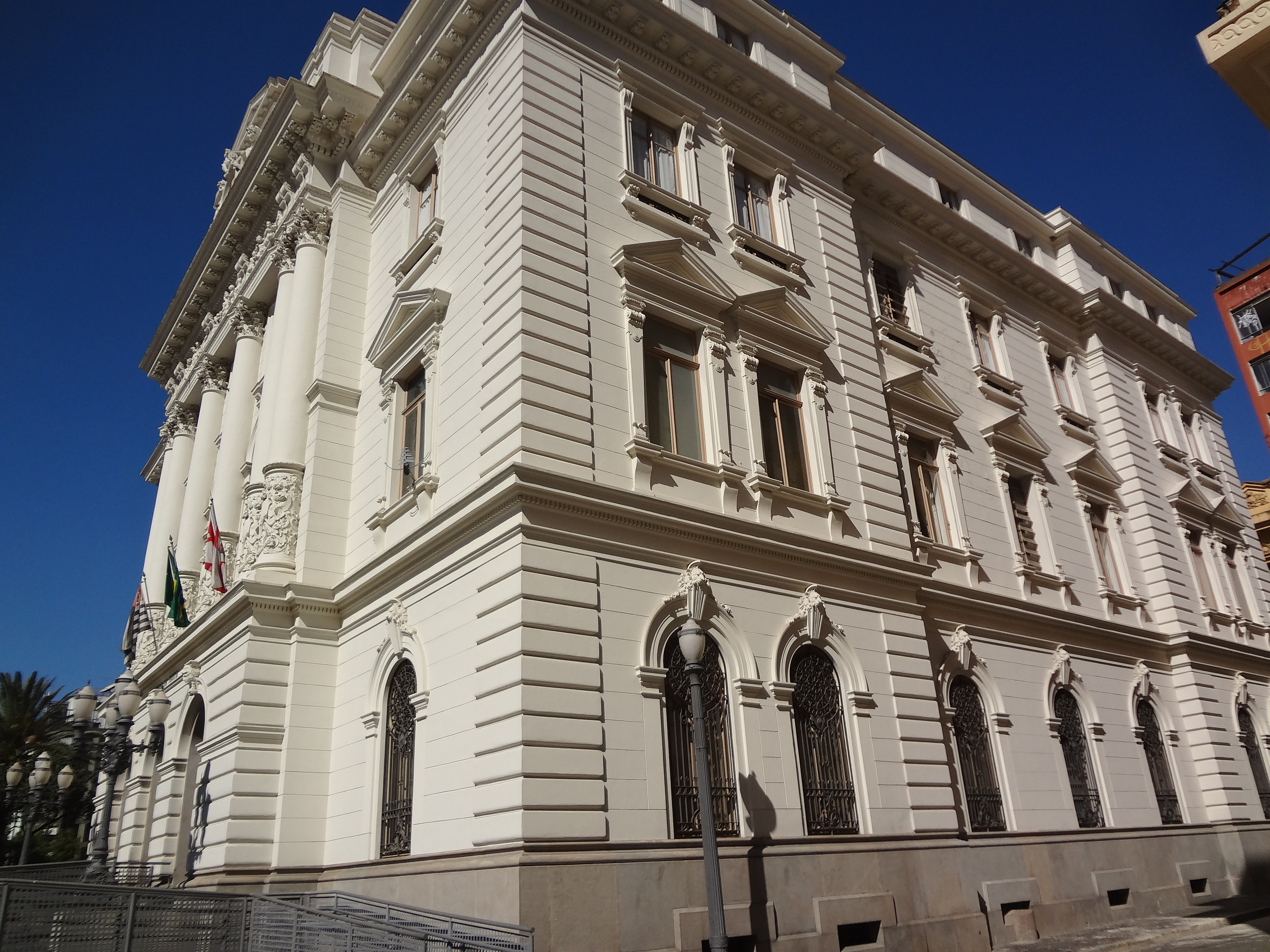 Vista da esquina da fachada do antigo edifício um da Secretaria da Agricultura e da Fazenda, atual Secretaria da Justiça.